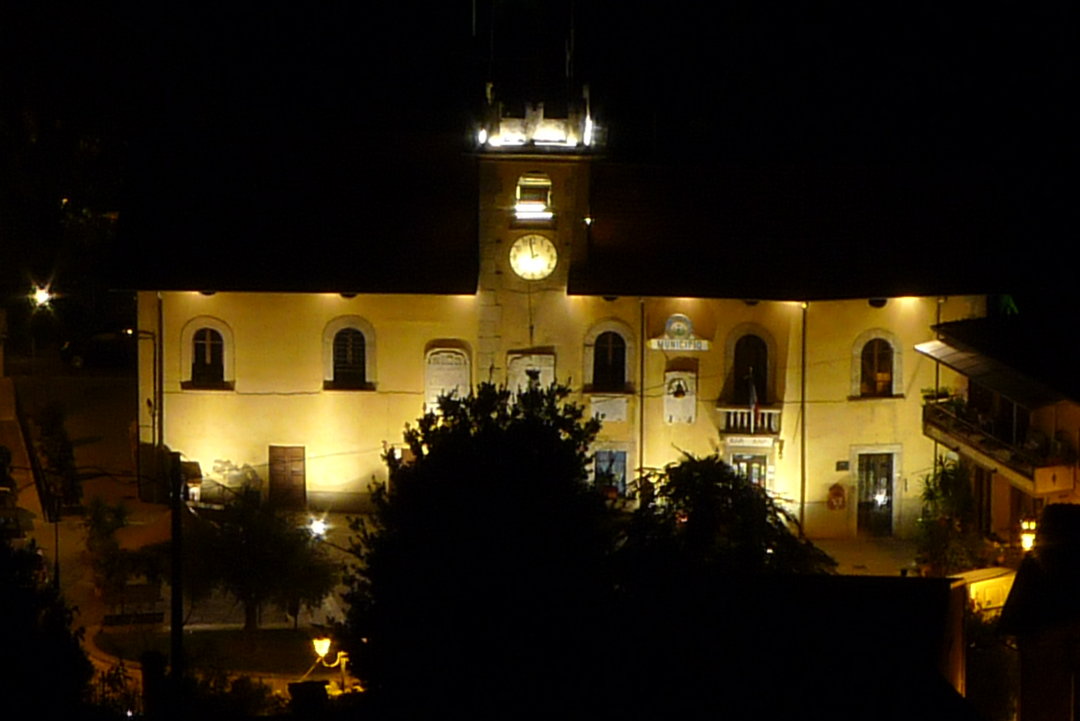 Palazzo storico del comune - visione notturna